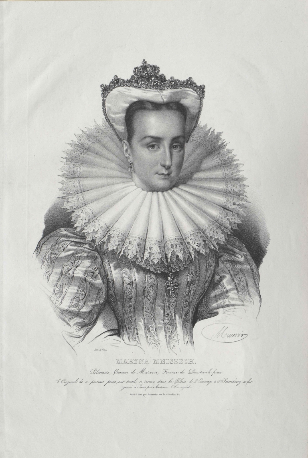 Portrait de Marine Mniszech (c. 1588-1614/5). Rare lithographie de Jean-François Villain d’après le dessin de Maurin inspiré de la gravure originale d’Antoine Olesczynski (1794-1879), milieu du XIXe siècle. 49 x 34 cm. Марина Мнишек (ок. 1588-1614/5). Редкая литография. Maurin, по оригиналу А. Olesczynski (1794- 1879), середина XIX в. Марина Мнишек, супруга Лжедмитрия I, коронована в Москве 8 мая 1606 г